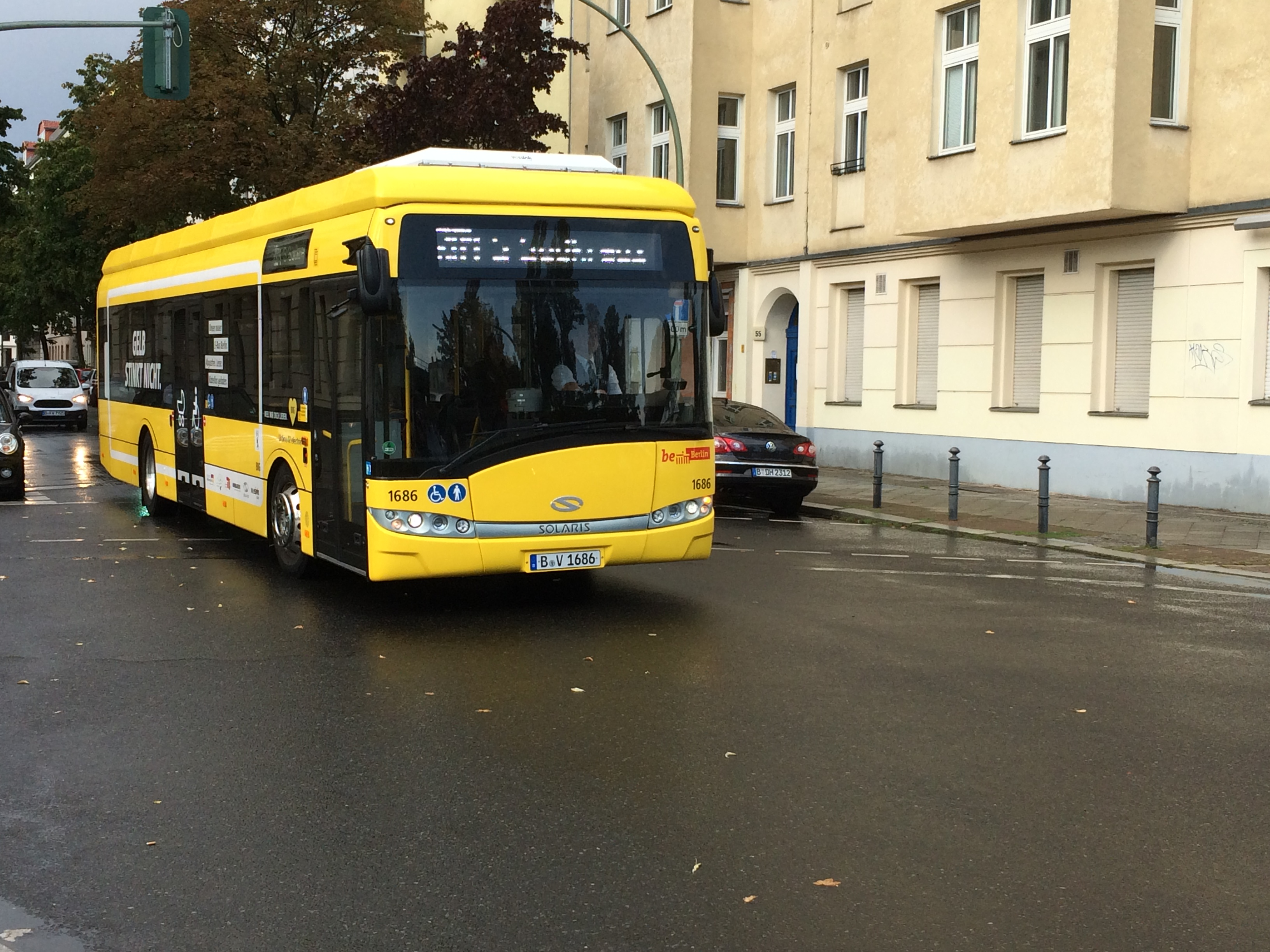 BVG-Bus der Linie 204, Solaris Urbino 12 electric, Torgauer-Str. (Rote Insel)